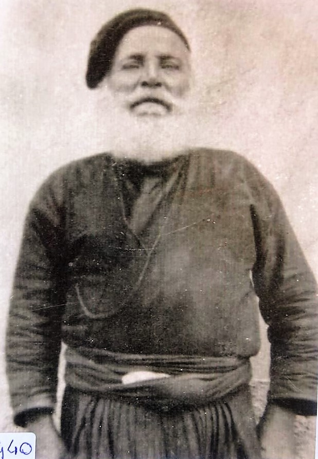 Ο εφημέριος της ενορίας π. Νικόλαος Μαρκάκης